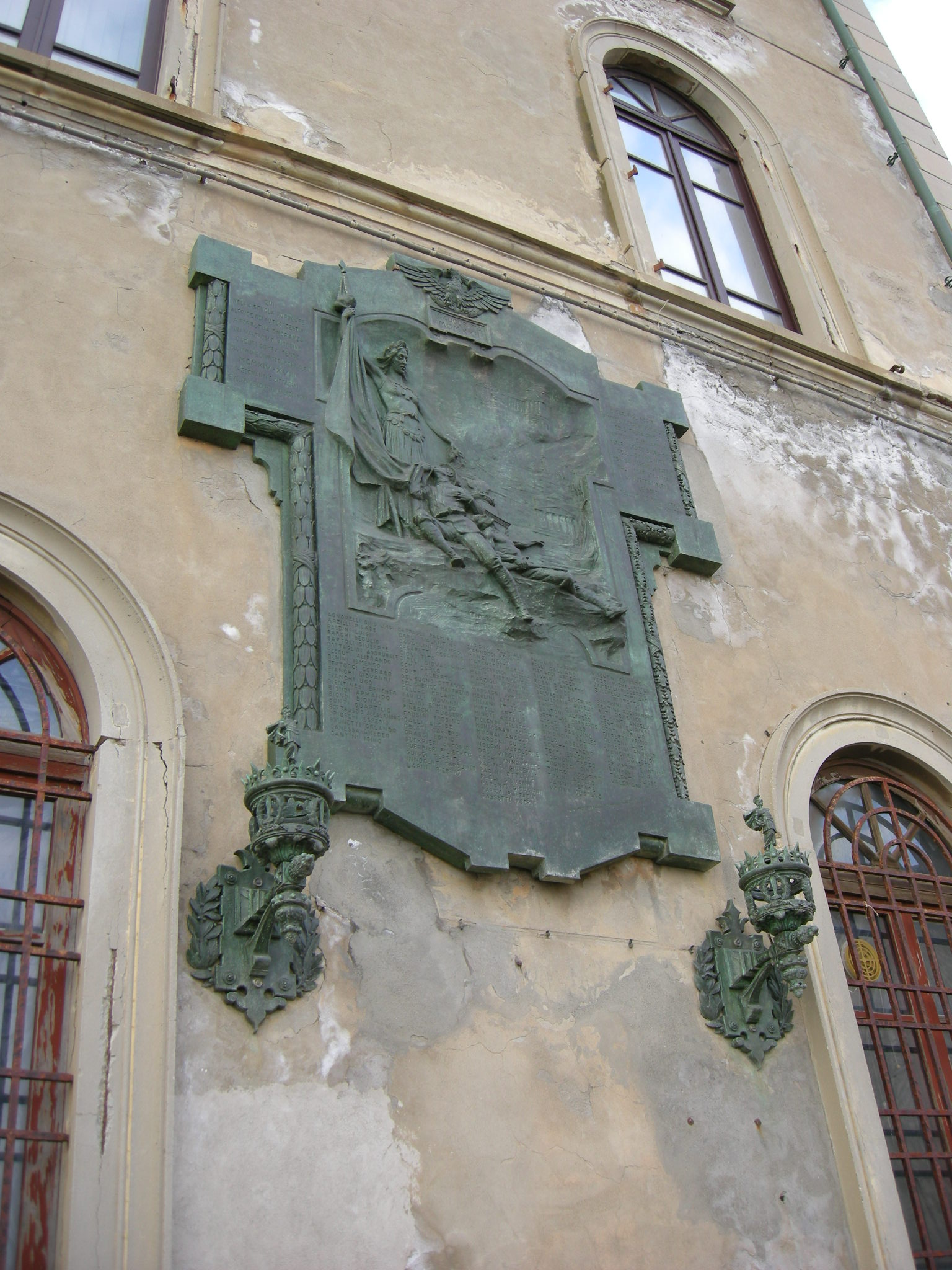 Palazzo appiani 01 stemma